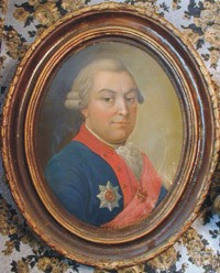 Портрет Ивана Михайловича Измайлова (1724-87)